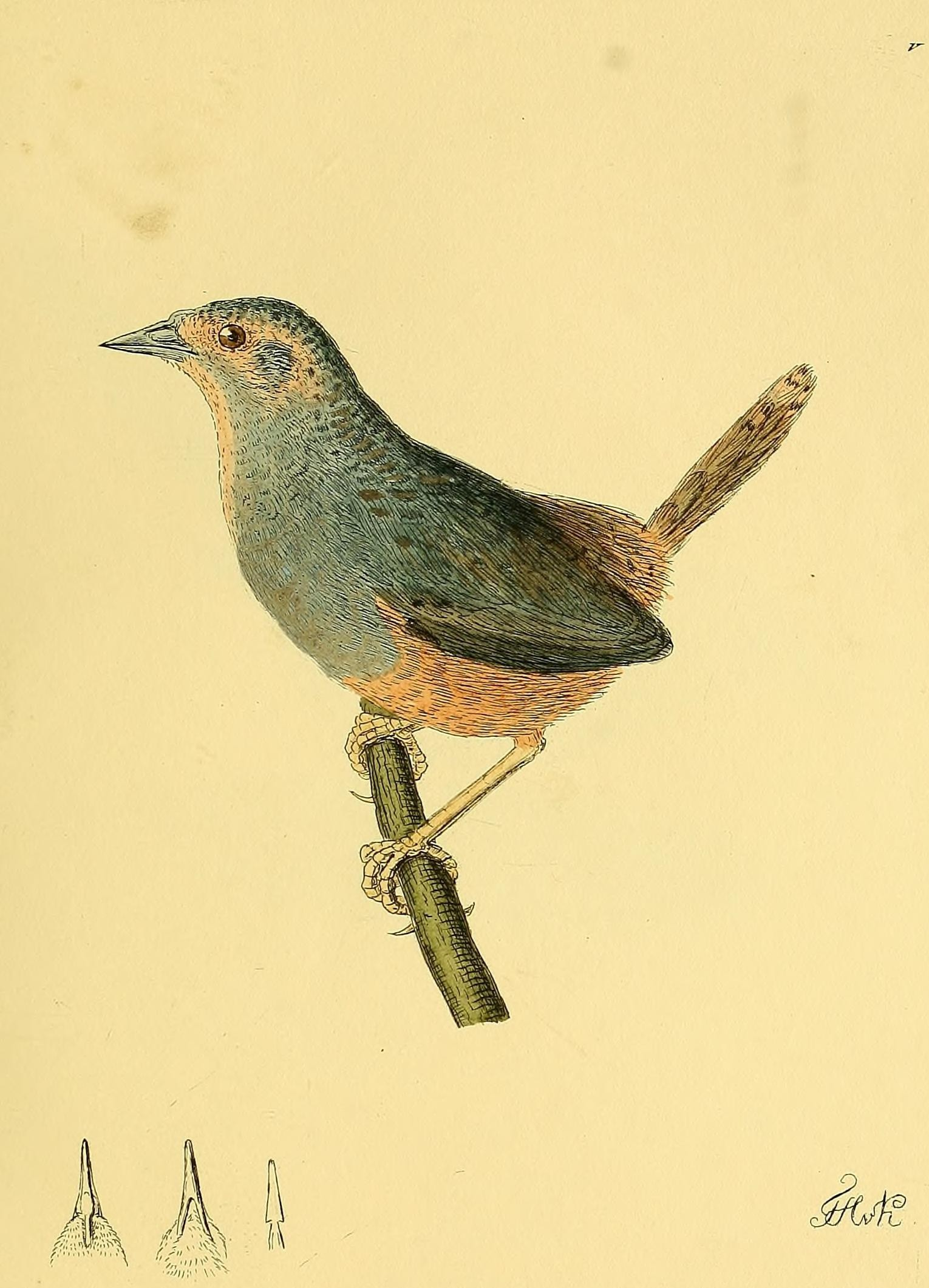 Oiili